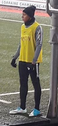 Mbappé vs ASNL (6 may 2017).